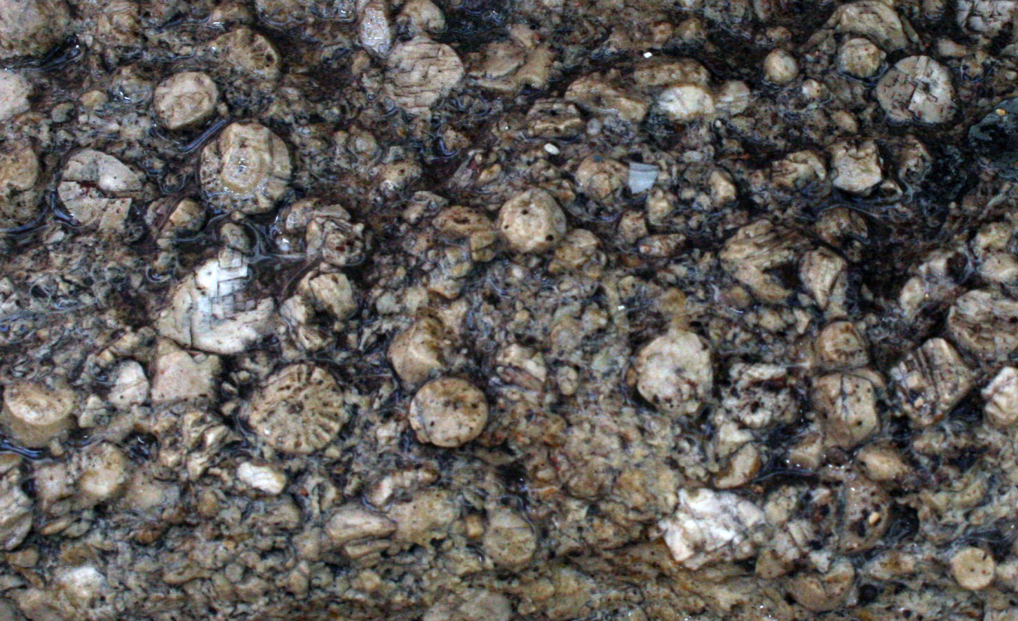 Detailaufnahme von angewittertem „Erkeroder Trochitenkalk“ (stratigraphisch unterer Oberer Muschelkalk, mo1, Mitteltrias), aufgenommen im aufgelassenen Steinbruch am Westholz bei Erkerorde am Elm